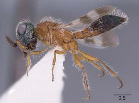 Scelio masneri (OSUC 235076).